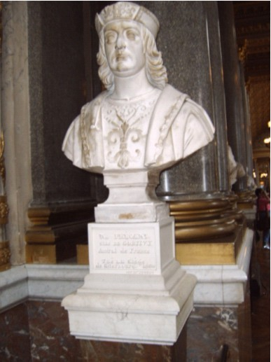 buste de la galerie des batailles du château de Versailles